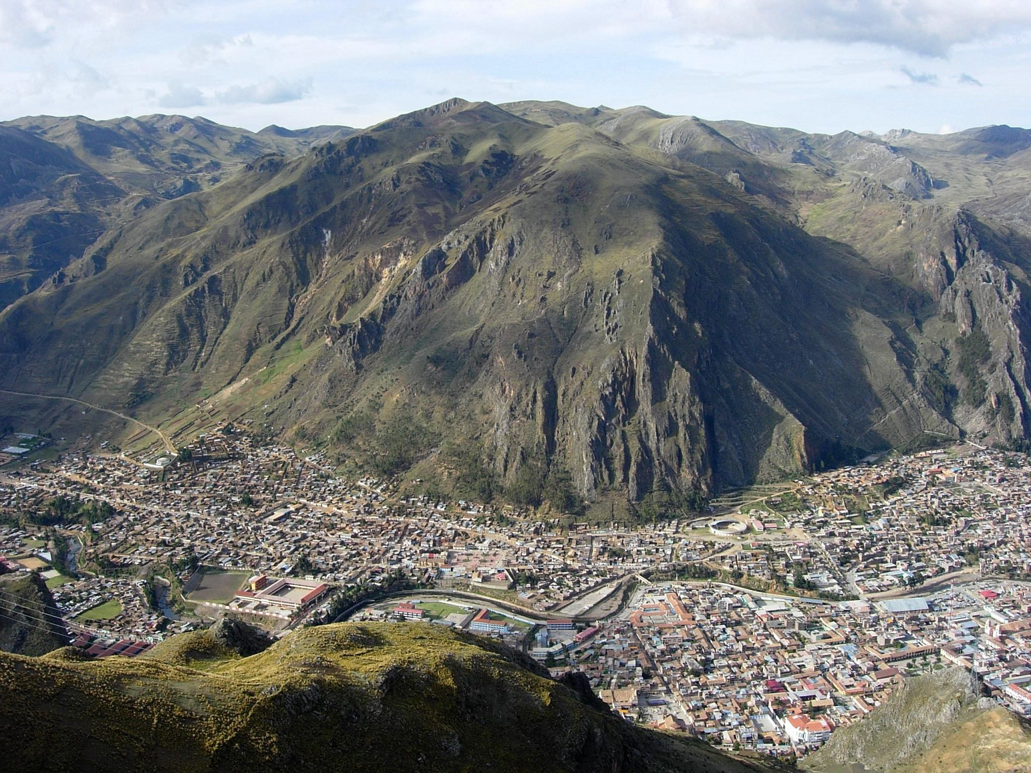 Panorámica de Huancavelica. Licensing